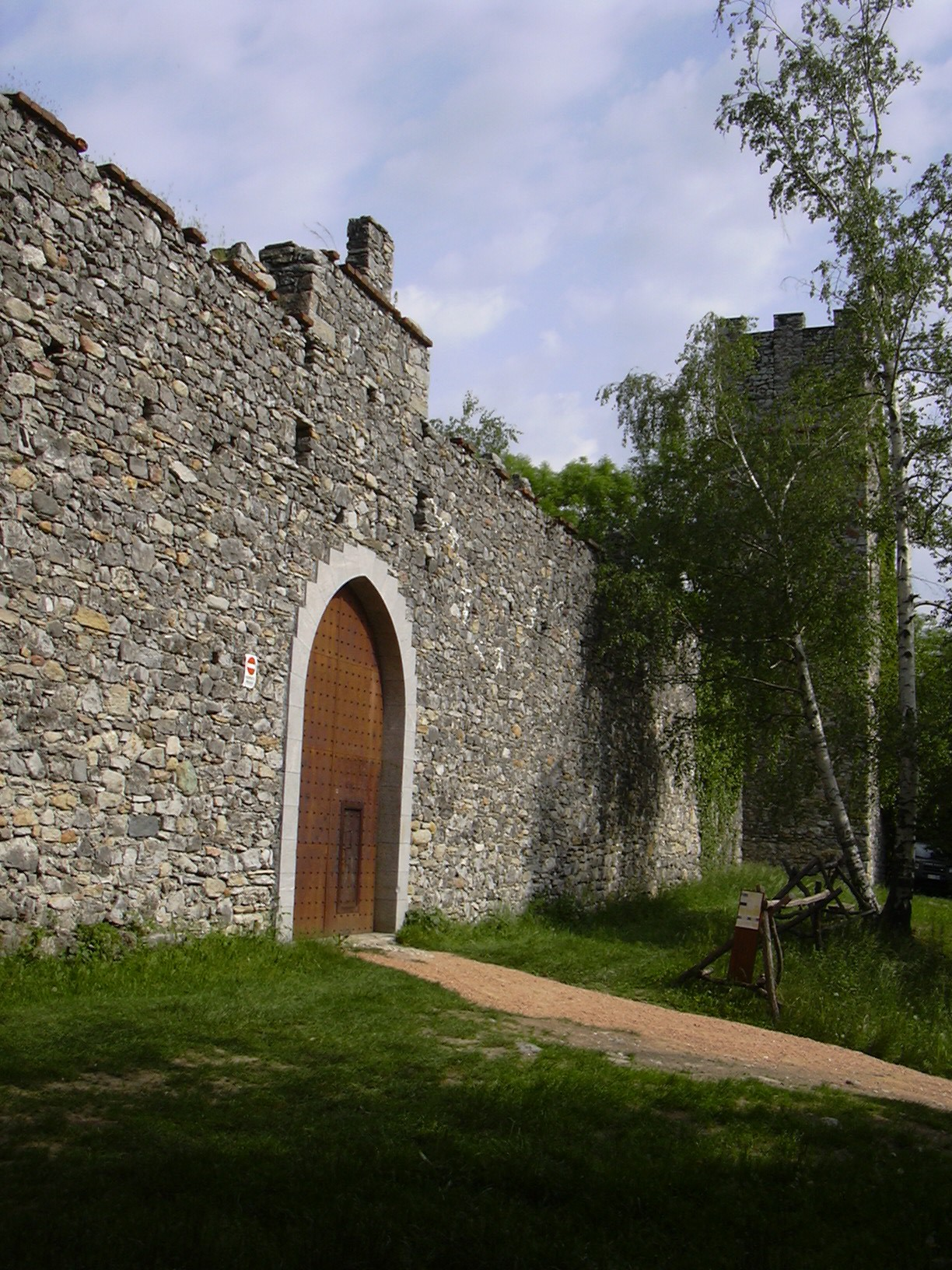 Rocca medioevale sita nel comune di Orino, provincia di Varese, all'interno del Parco regionale Campo dei Fiori.